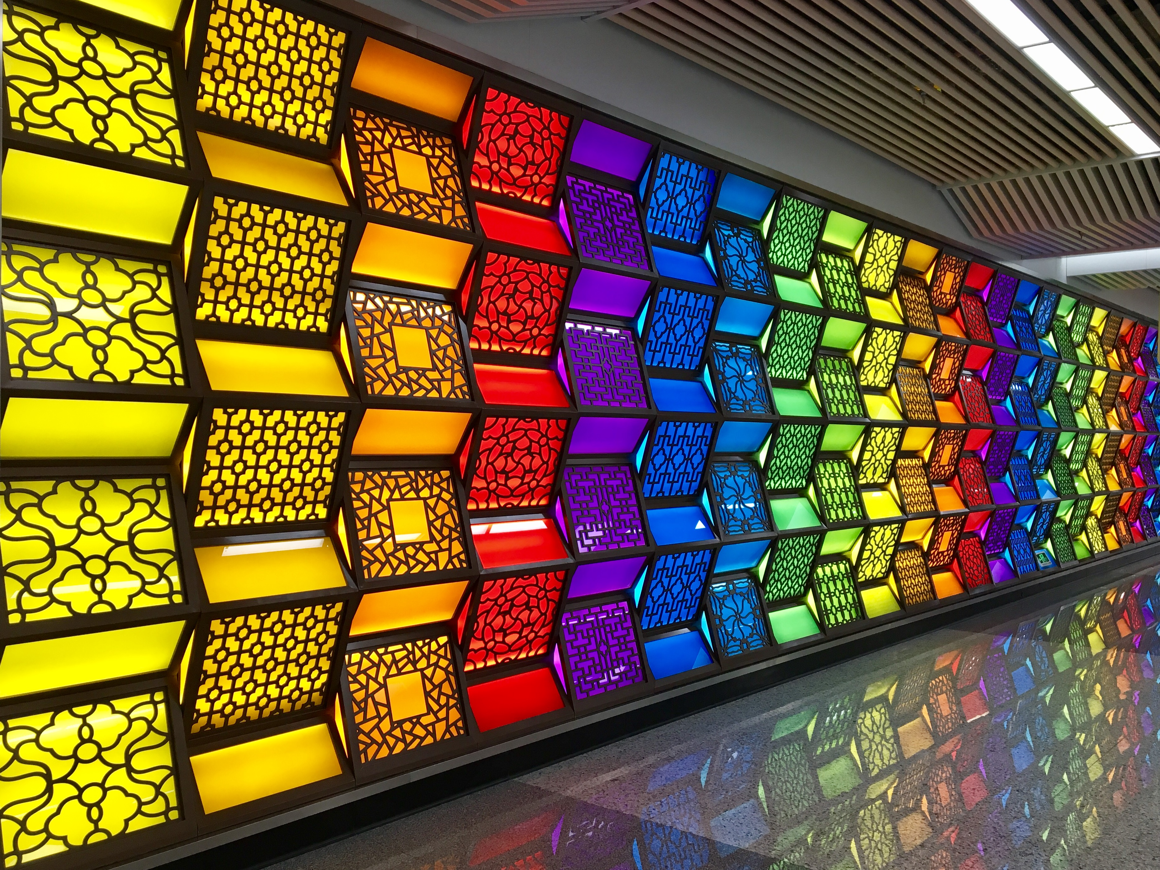 红庄地铁站文化墙